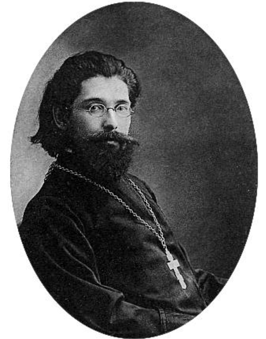 Иван Васильевич Титов (Иоанн; 18 февраля 1879, Пермская губерния — 18 октября 1948, Париж) — священник, депутат III и IV Государственных Дум от Пермской губернии (1907—1917), кандидат в делегаты Учредительного собрания (1917).